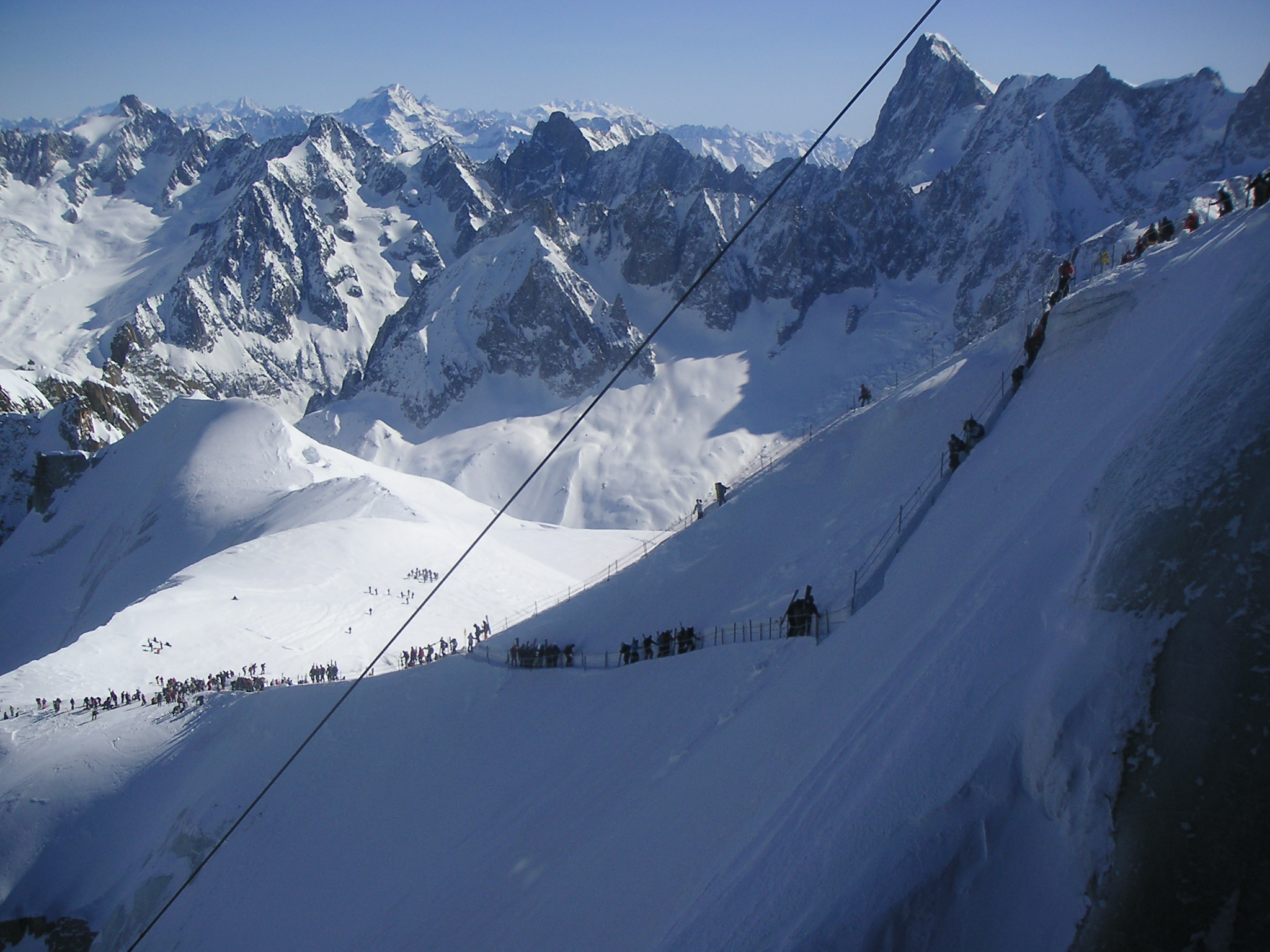 Vallée blanche - début de la descente en rappel depuis l'arrivée du téléphérique de l'Aiguille du Midi